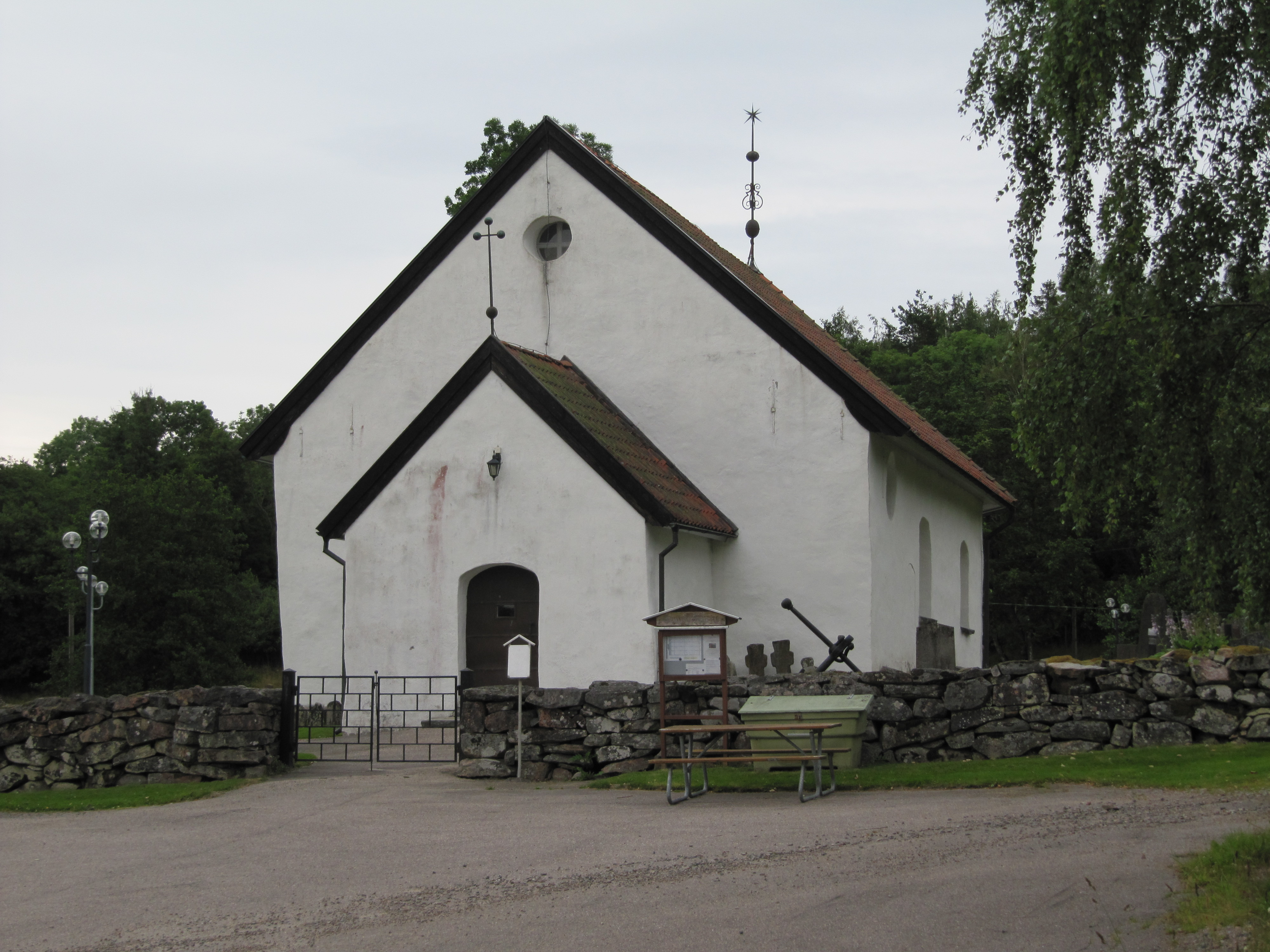 Tunge kyrka